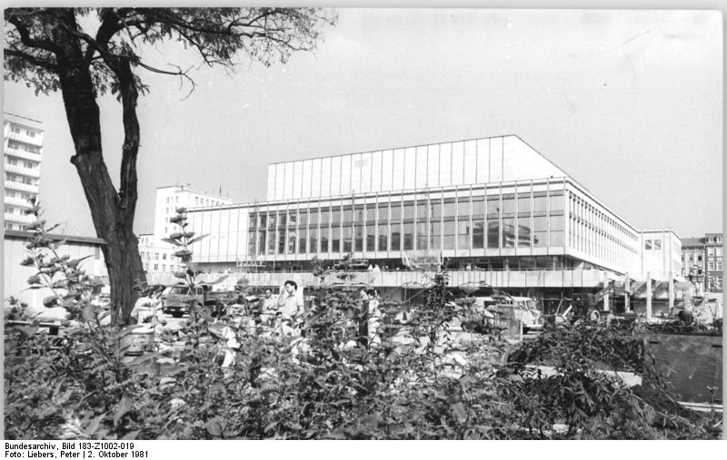 Gera, Haus der Kultur ADN-ZB Liebers-2.10.81-Bau. Gera: Ein neues Haus der Kultur ist in Gera seiner Bestimmung übergeben worden. Der mit Sandstein und Glas verkleidete Bau verfügt über einen Saal mit maximal 1683 Plätzen, mehrere Klub-und Zirkelräume sowie fünf gastronomische Einrichtungen.